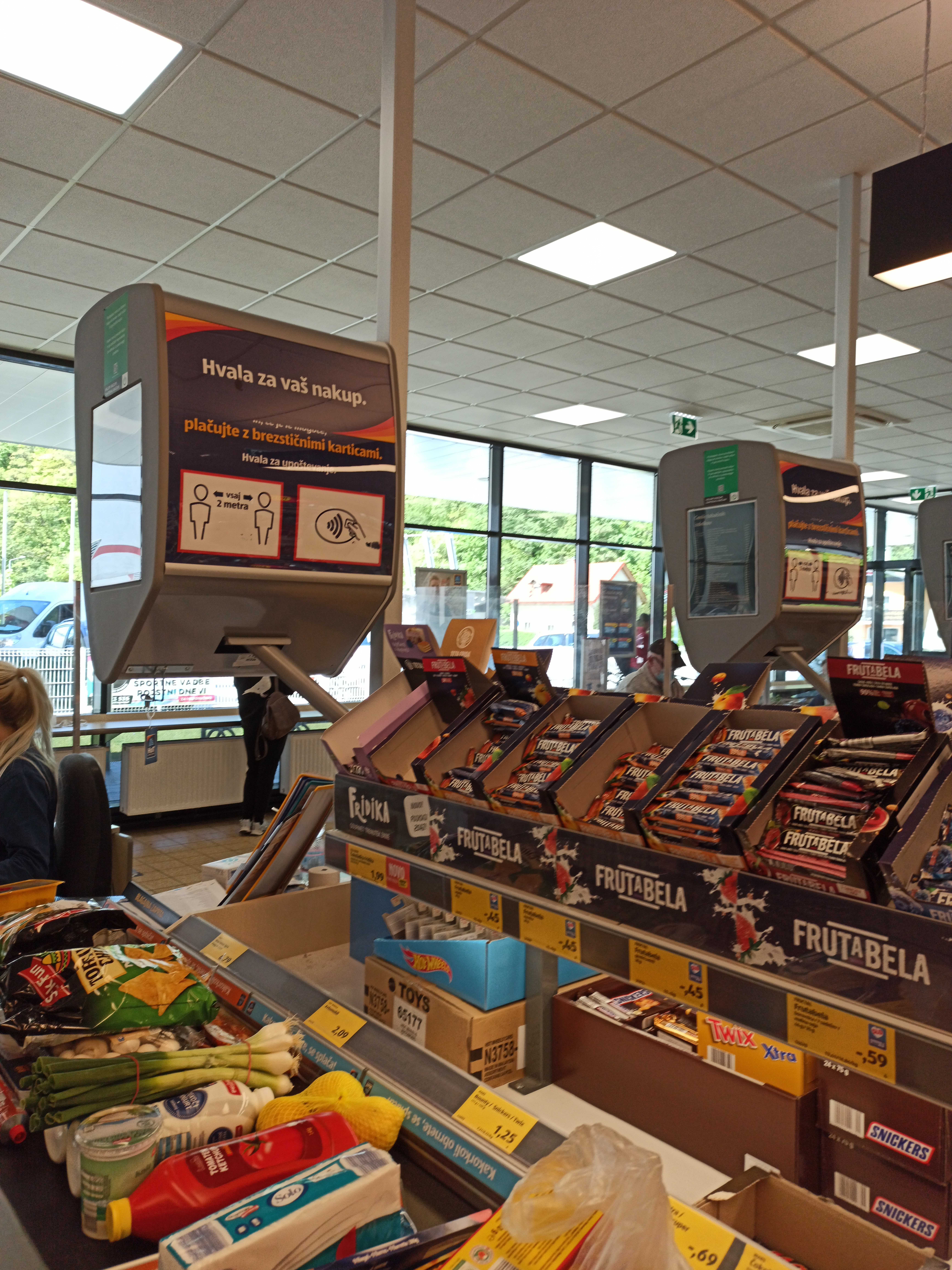 Opozorilo za upoštevanje medsebojne razdalje in priporočilo za plačevanje z brezstičnimi karticami pri blagajnah v trgovinah Hofer Slovenija v času pandemije Covid-19